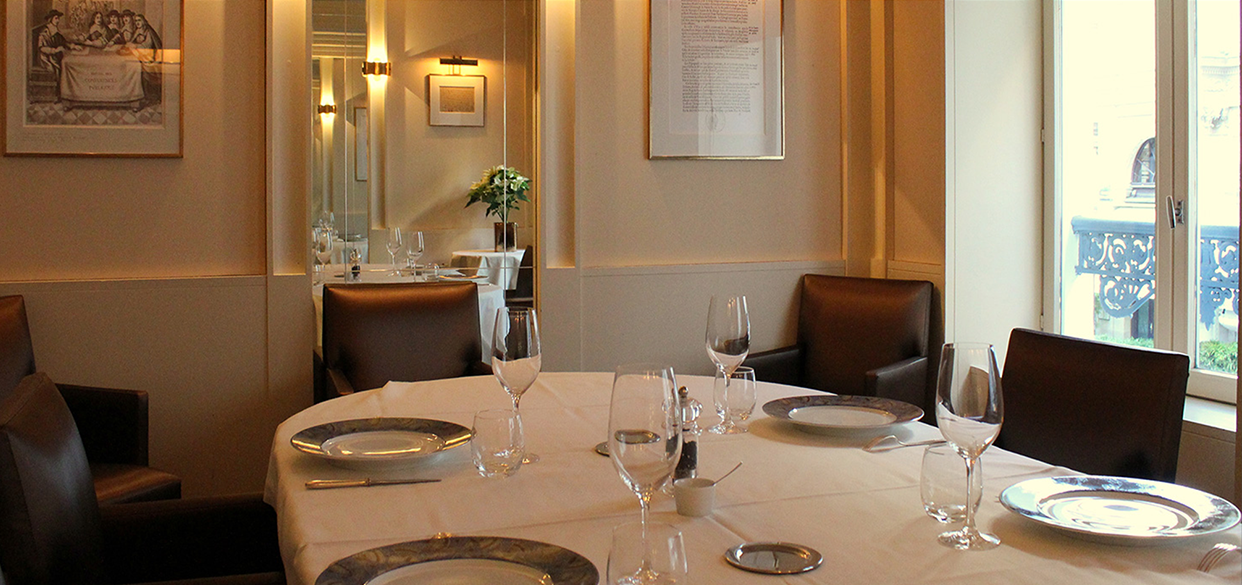 Prix littéraire Renaudot au Drouant par antoine westermann à paris